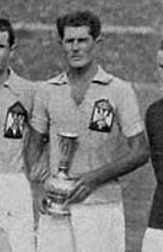 Milutin Ivković en 1930